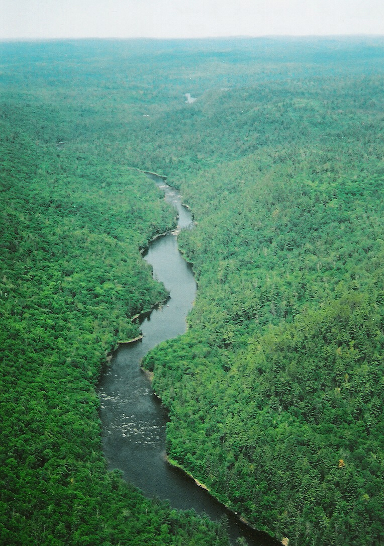 Dumoine River, between km 50 and 55.